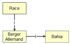 Mot Instance déclaratif